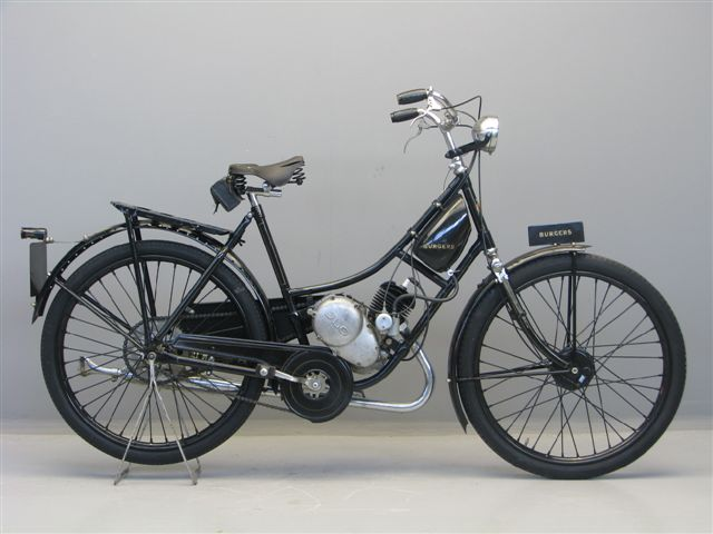 Burgers 100 cc ladies motorcycle with ILO engine from 1934.